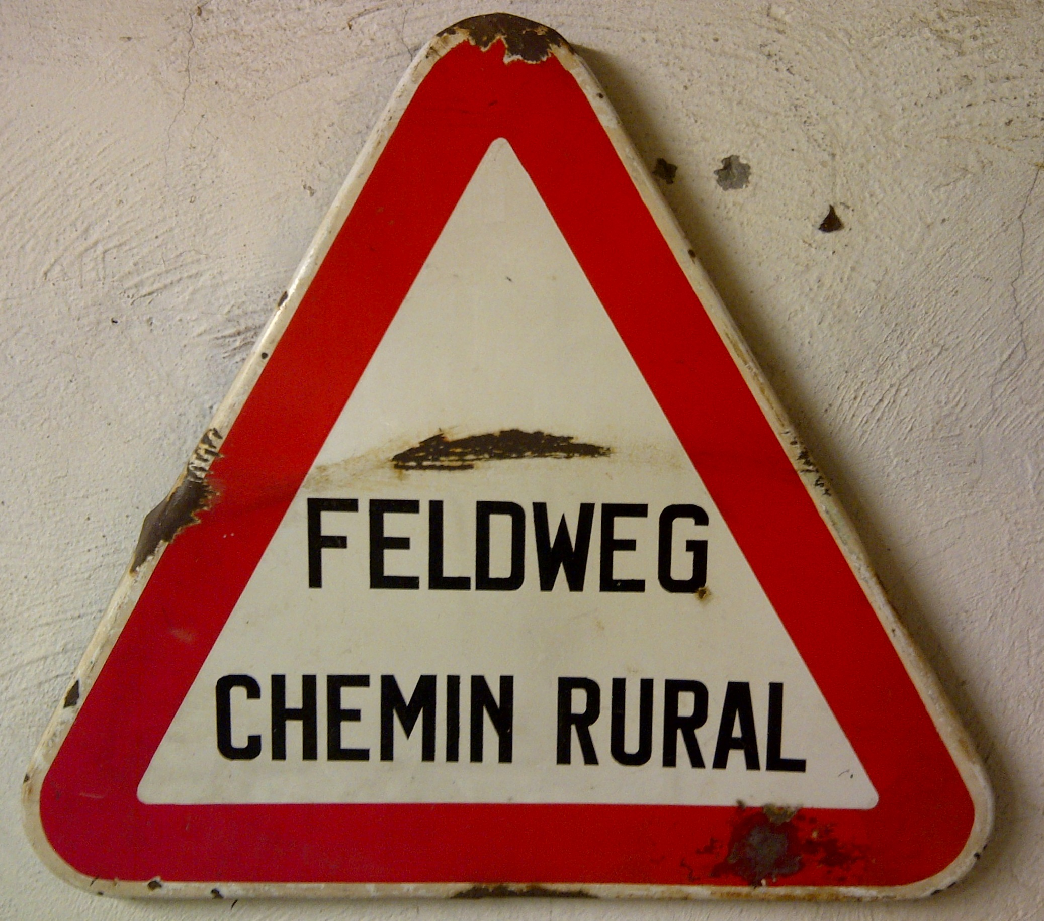 Fréiert Verkéiersschëld fir e Feldwee unzeweisen.